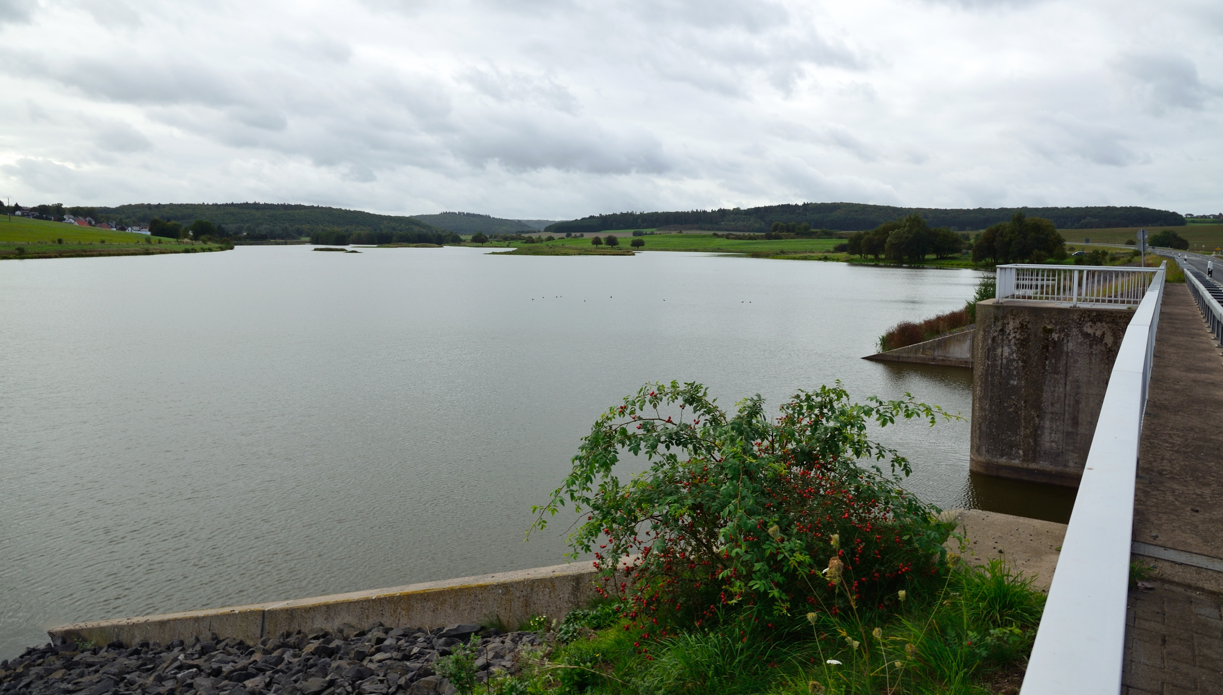 Aartalsee-Vorsperre, Naturschutzgebiet „Aartalsperre bei Mudersbach“